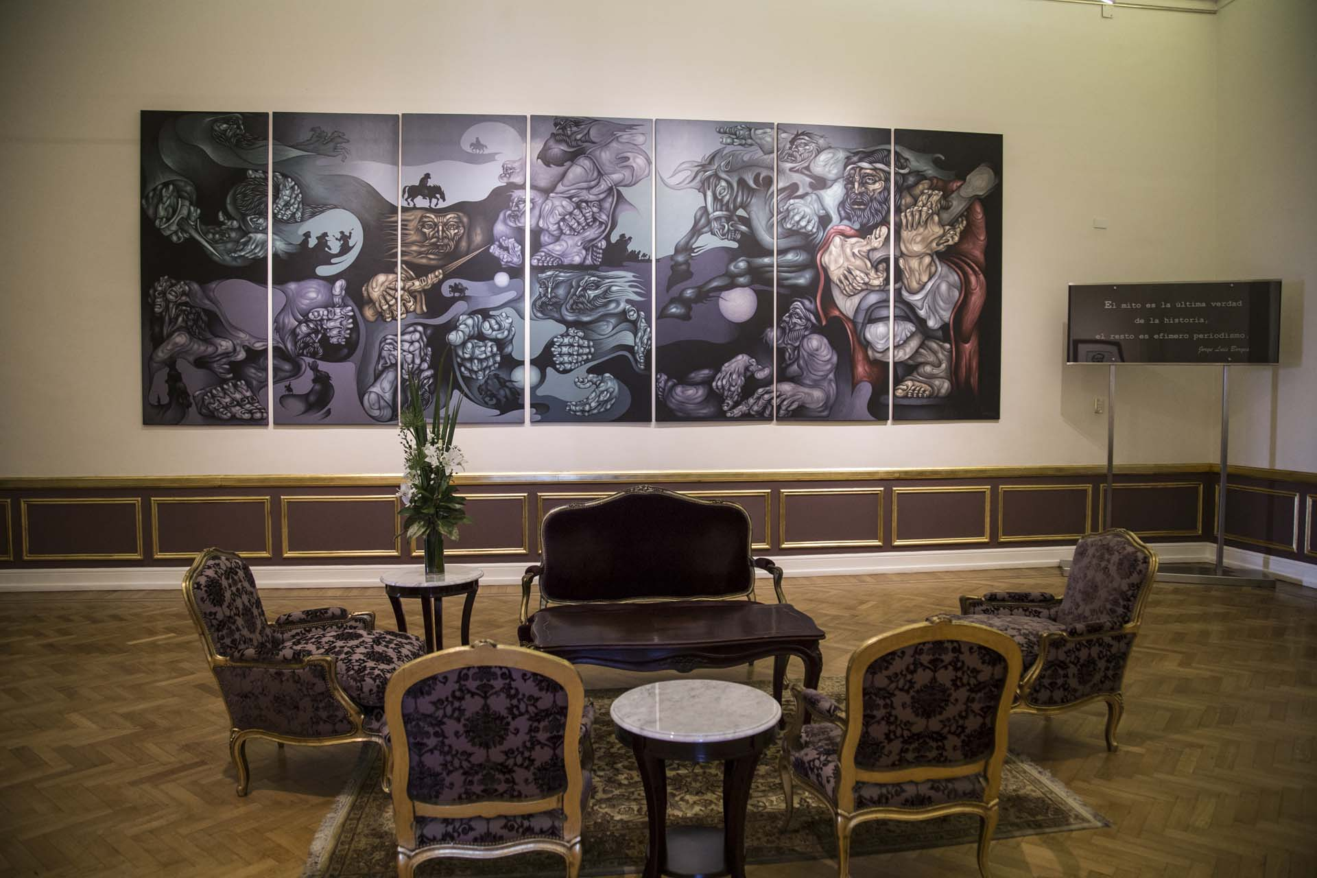 Salón Martín Fierro, Casa Rosada